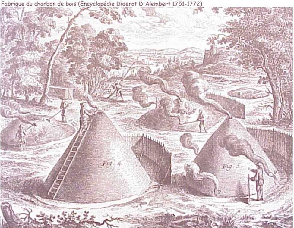 Gravure illustrant la fabrication du charbon "à l'ancienne".